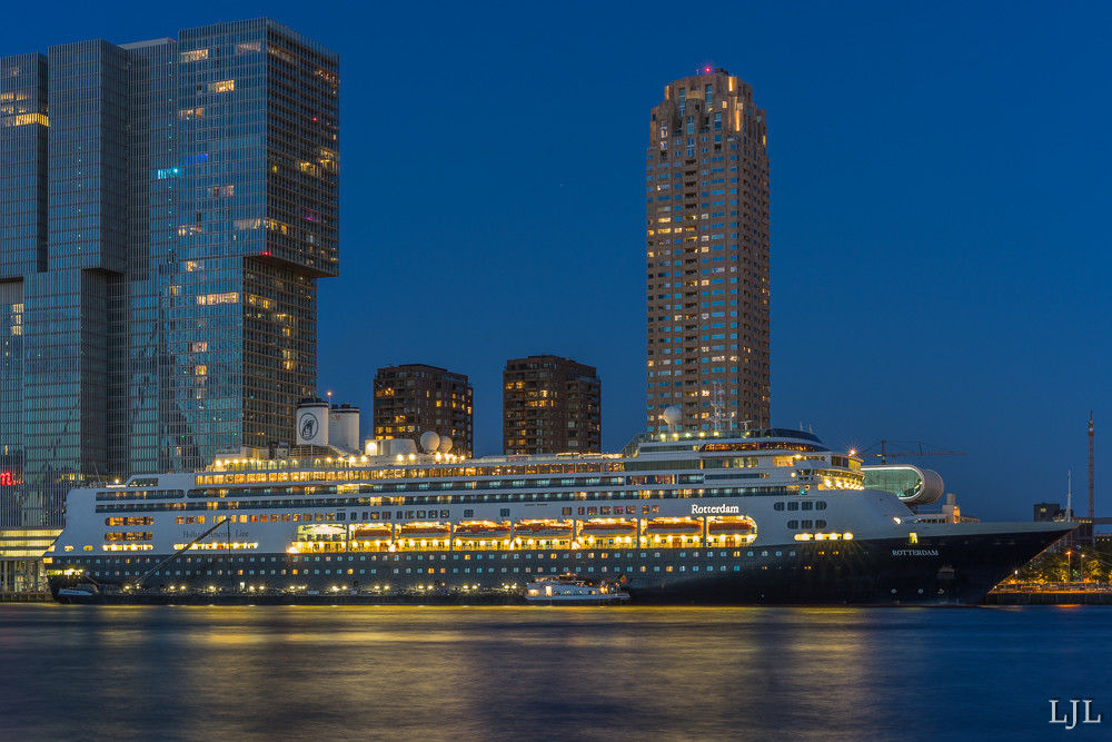 Ms Rotterdam in Rotterdam